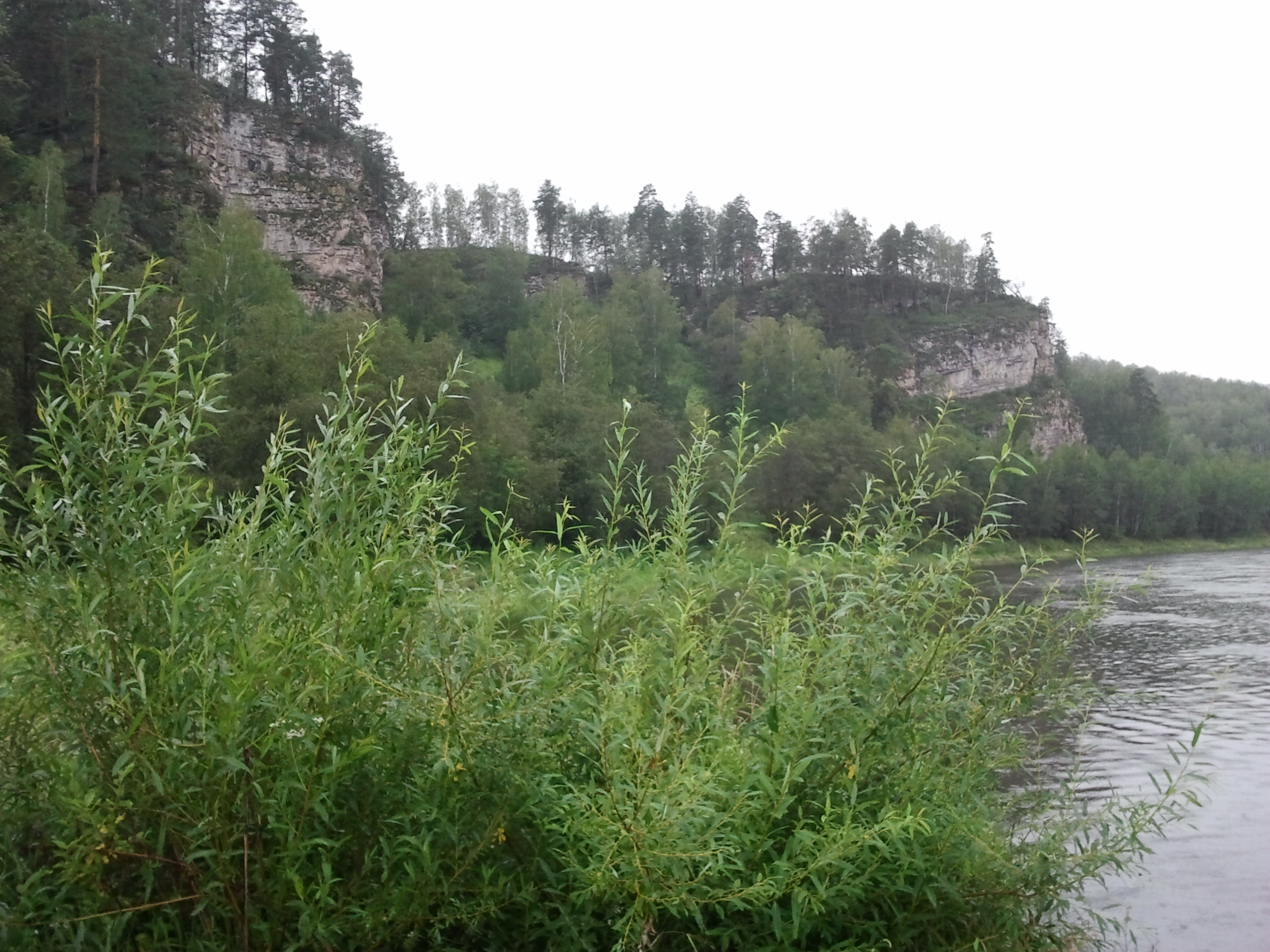 Река Ай